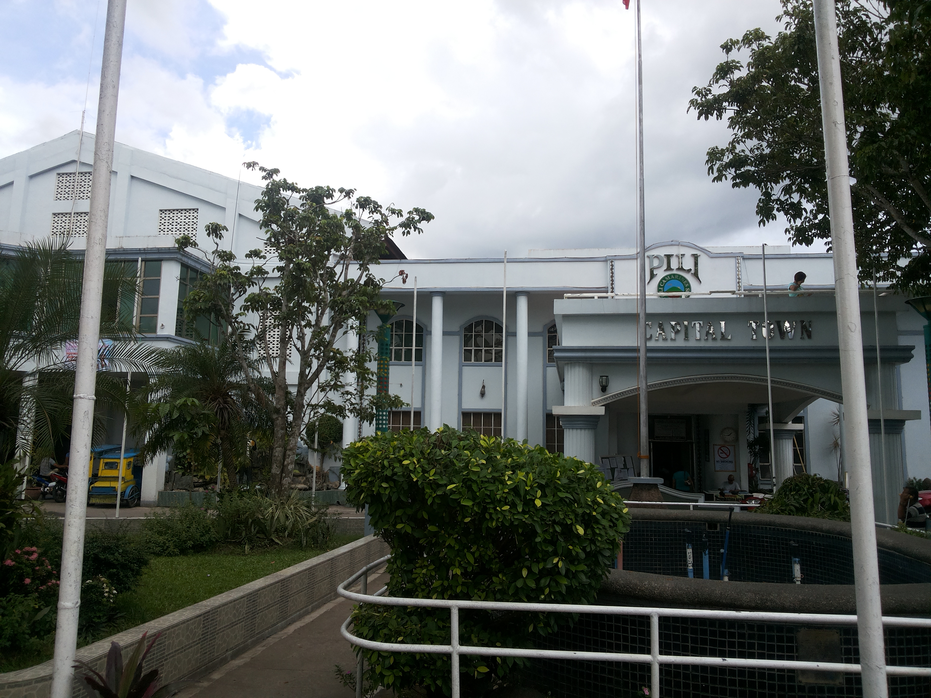 Bikol Central: munisipyo